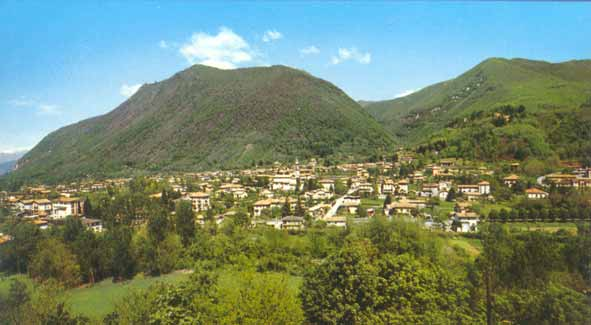 Panorama di Cittiglio